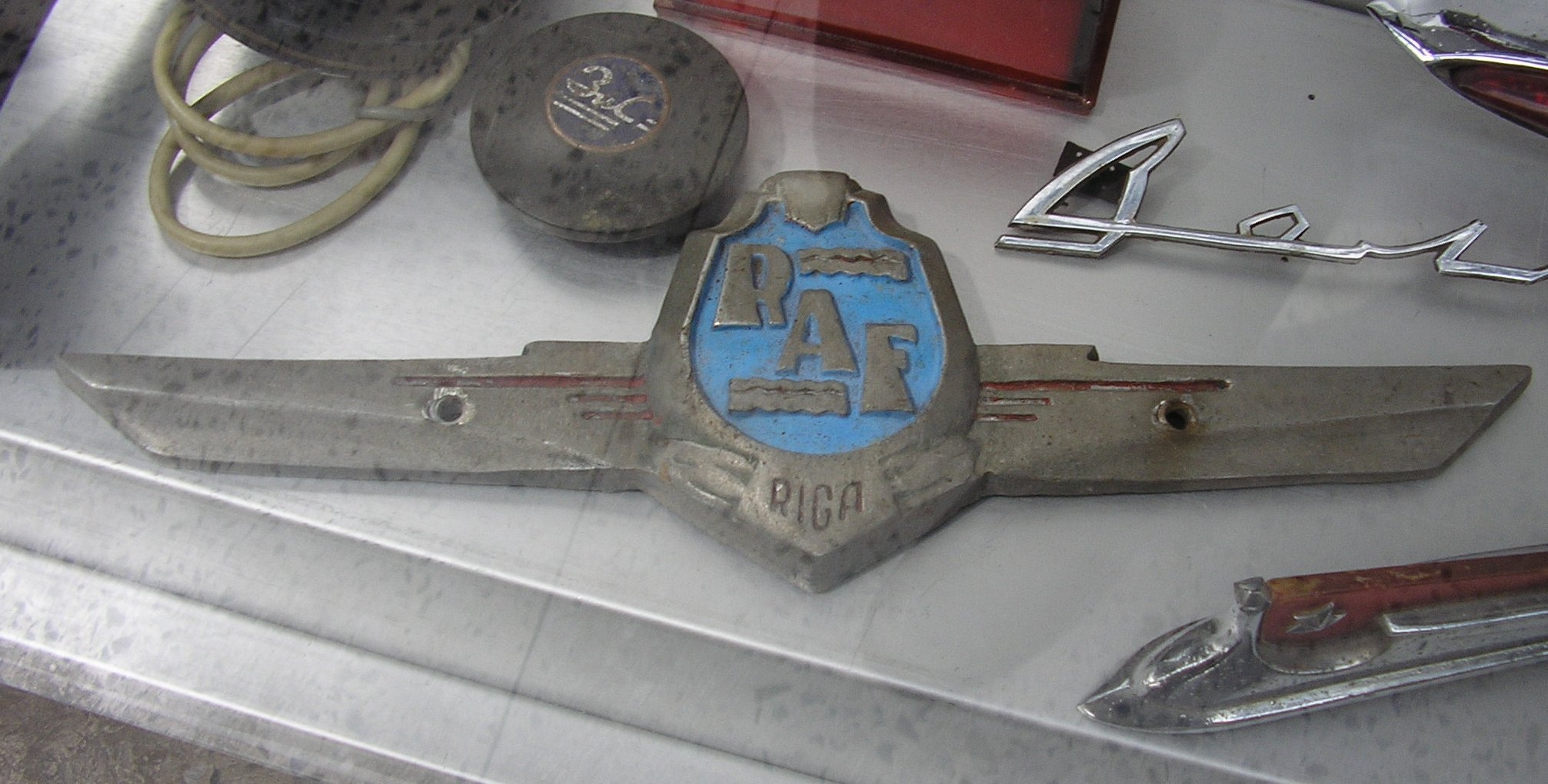 RAF logo